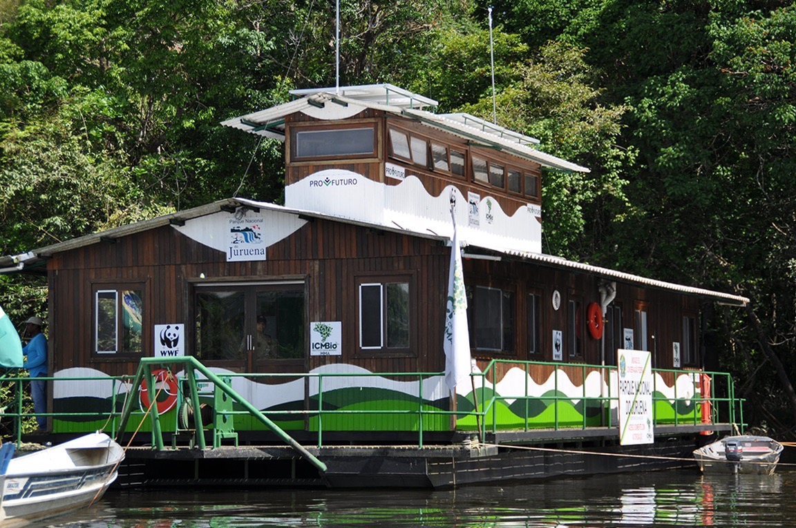 Foto der WWF-Expedition durch den Nationalpark Juruena im Juni 2013. Der WWF hat dabei geholfen, den Juruena Nationalpark im Jahr 2006 auszuweisen. Der WWF hat mit der Parkverwaltung des Nationalparks den ersten Kontrollposten gebaut und übergeben. Dieser Posten sichert über 100 Kilometer der nördlichen Grenze des Nationalparks entlang der Juruena-, Teles Pires- und Tapajos-Flüsse. Neben den Kontroll- und Überwachungsmaßnahmen dient er auch zur Umweltbildung.